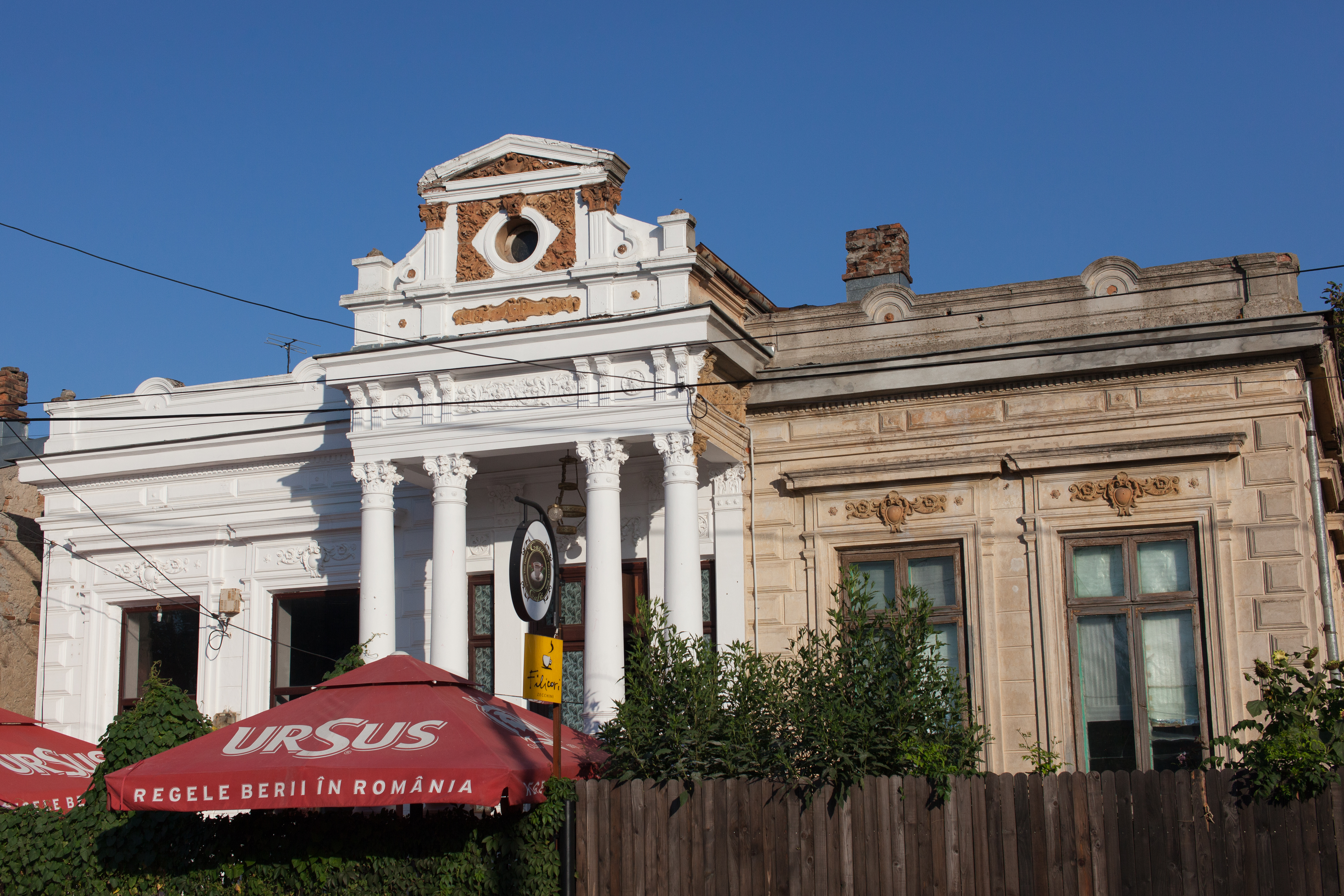 Casa Atanase Petrescu